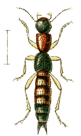 This file has been extracted from another file: Jacobs14.jpg